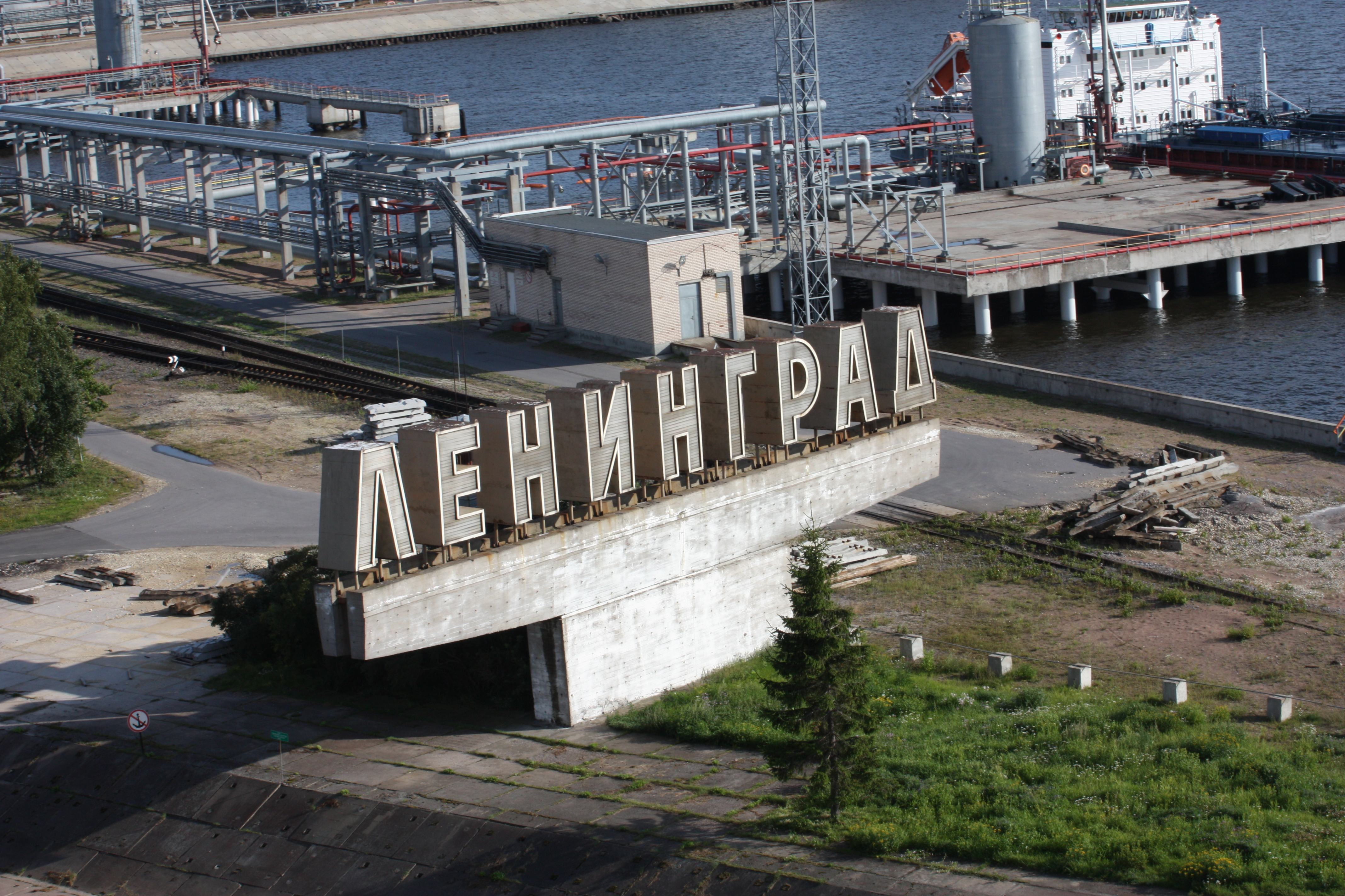 Port of Sain Petersburg Russia 2009